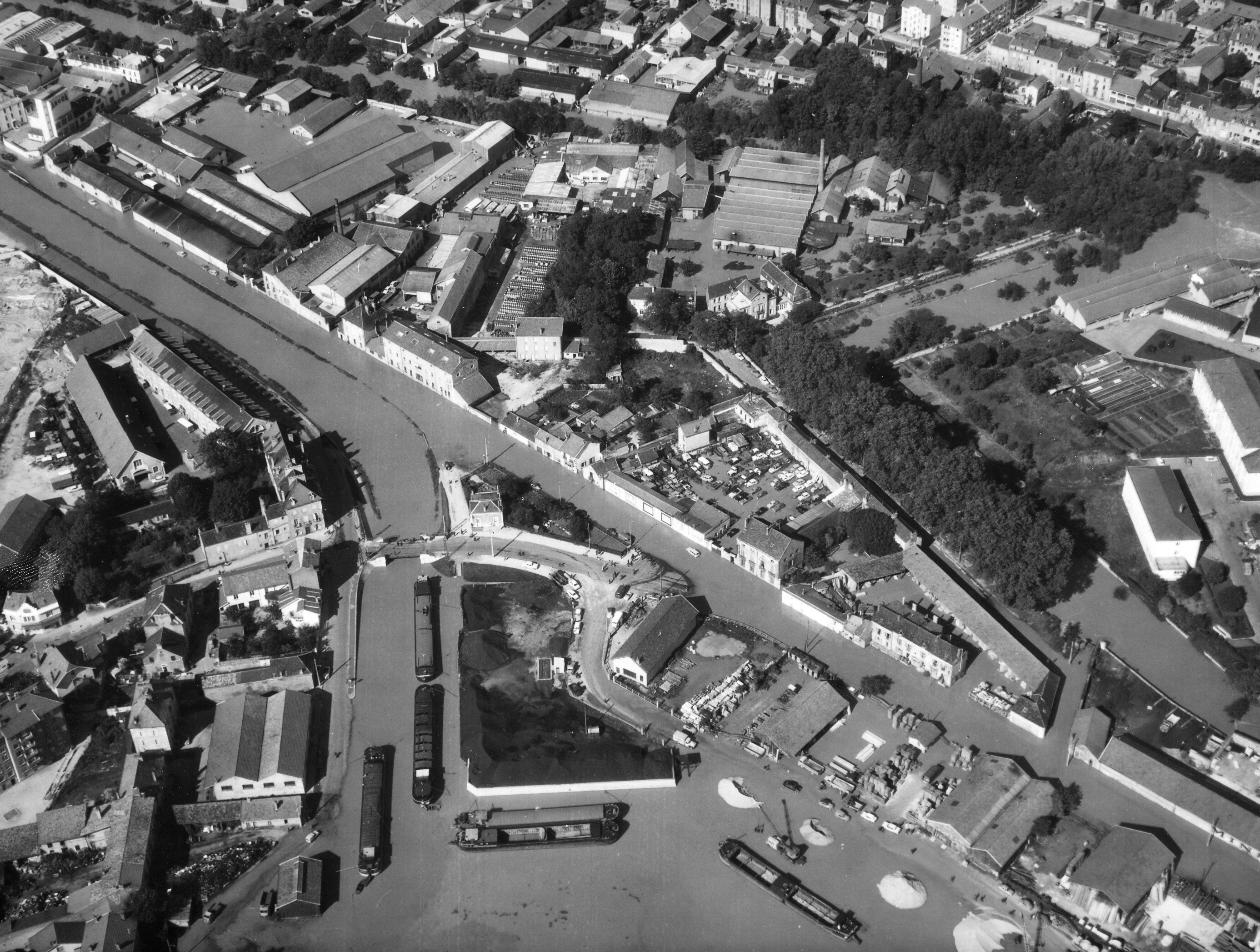 Photo aérienne en "noir et blanc".